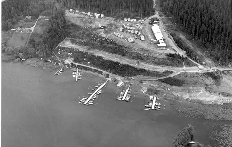 Från vänster syns Baset, Viksjö såg och Viksjö båthamn i Järfälla, 1967, flygfoto av SIAB. Järfälla kommuns bilddatabas. Bild nr 17018.